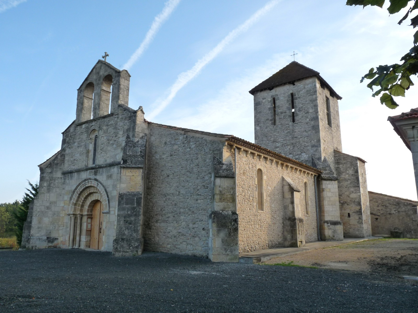 Eglise de Générac, Gironde, France